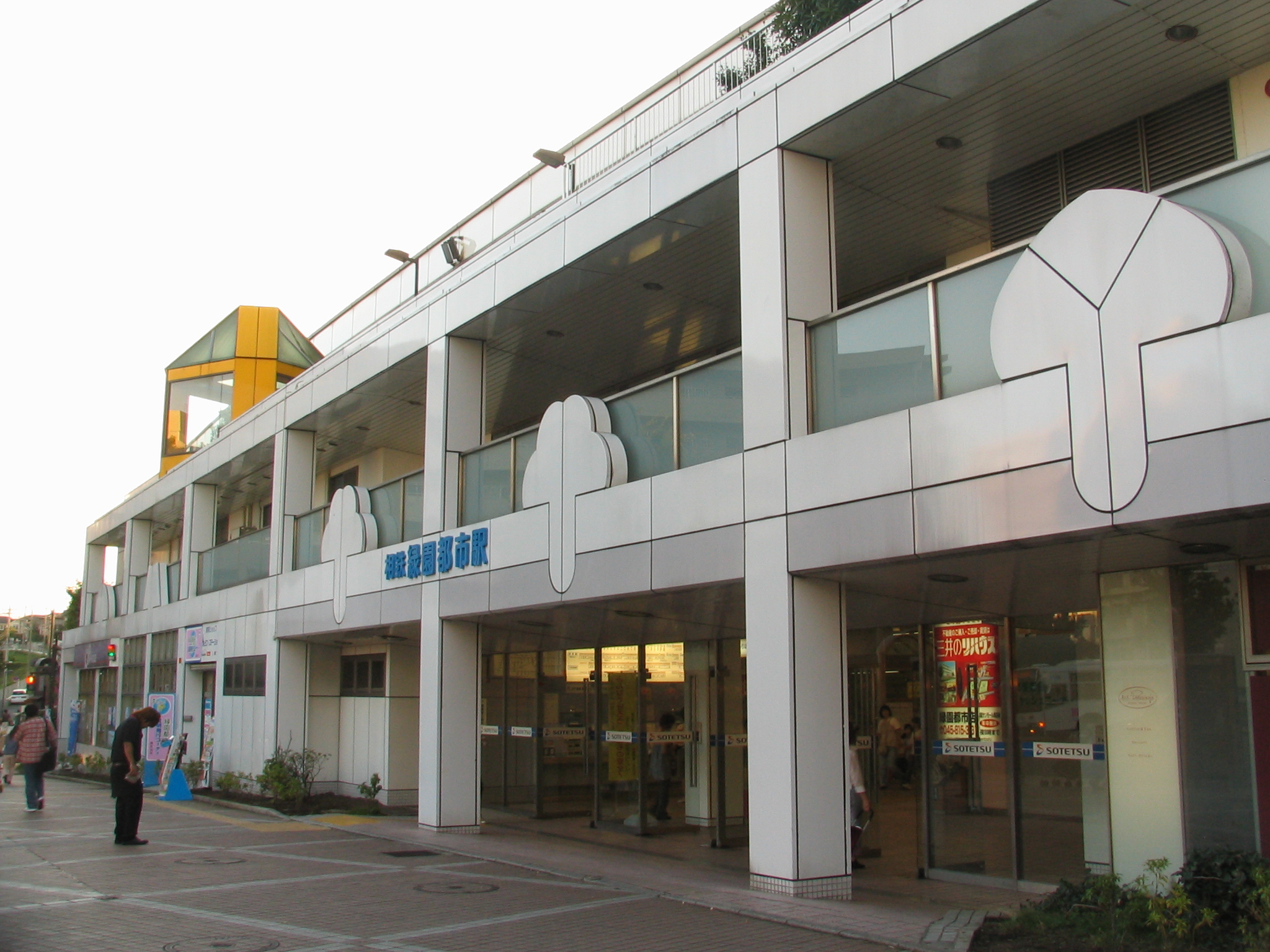 相模鉄道緑園都市駅Ryokuentoshi Station (Sagami Railway Izumino Line).